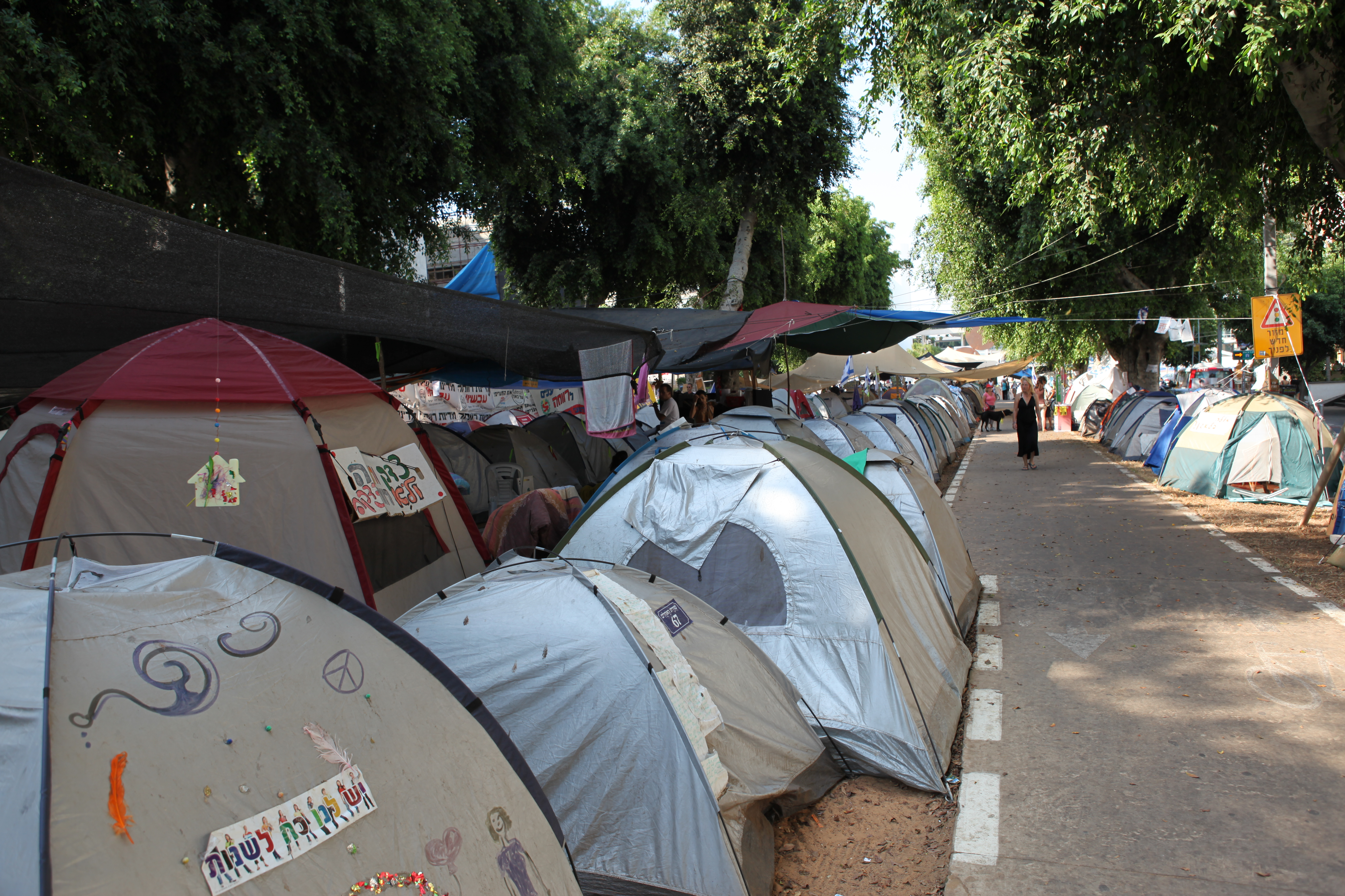 Tel Aviv 'Tent Protest' Tel Aviv-Yafo